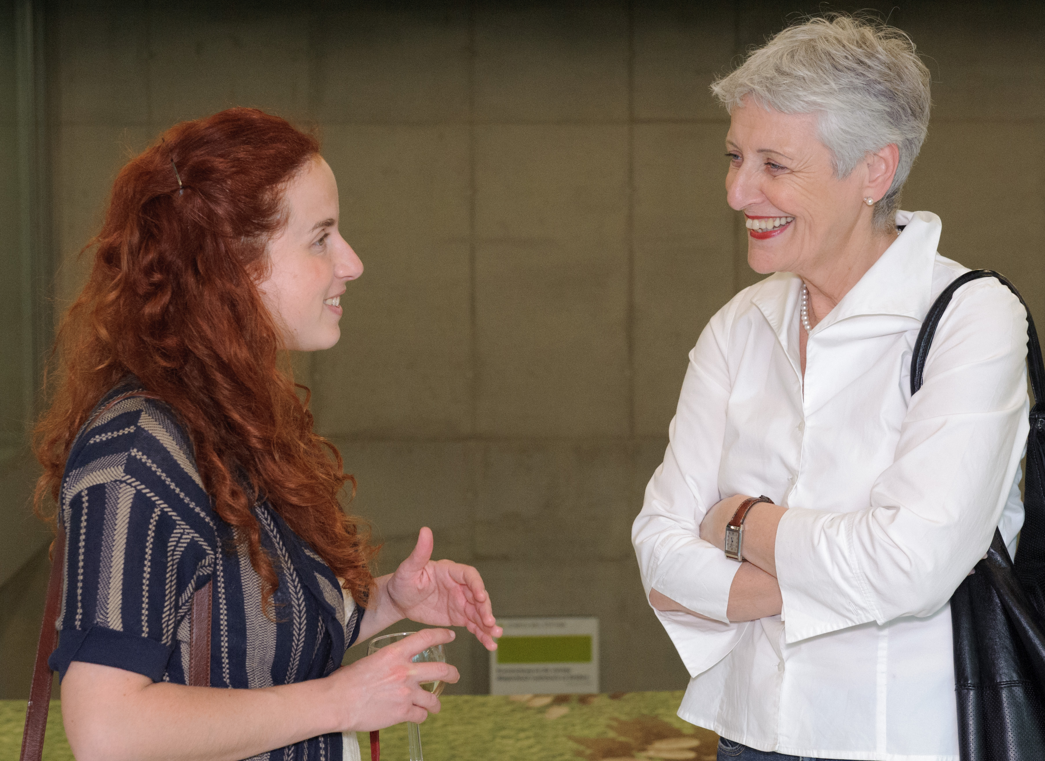 Stav Shaffir (Social Protest Movement, Israel) im Gespräch mit Marieluise Beck (MdB Bündnis90/Die Grünen) Foto: Stephan Roehl